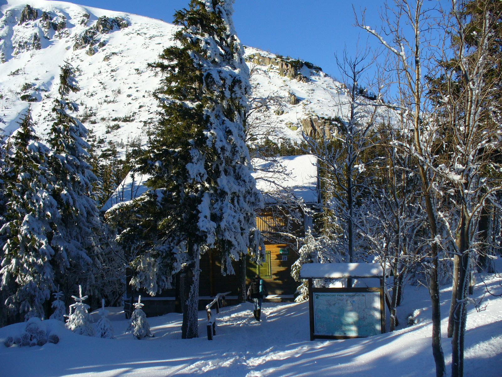 Dawny domek myśliwski hrabiów Schaffgotsch, potem przez jakiś czas schronisko studenckie - obecnie punkt informacyjny parku narodowego. Karkonosze, Kocioł Małego Stawu